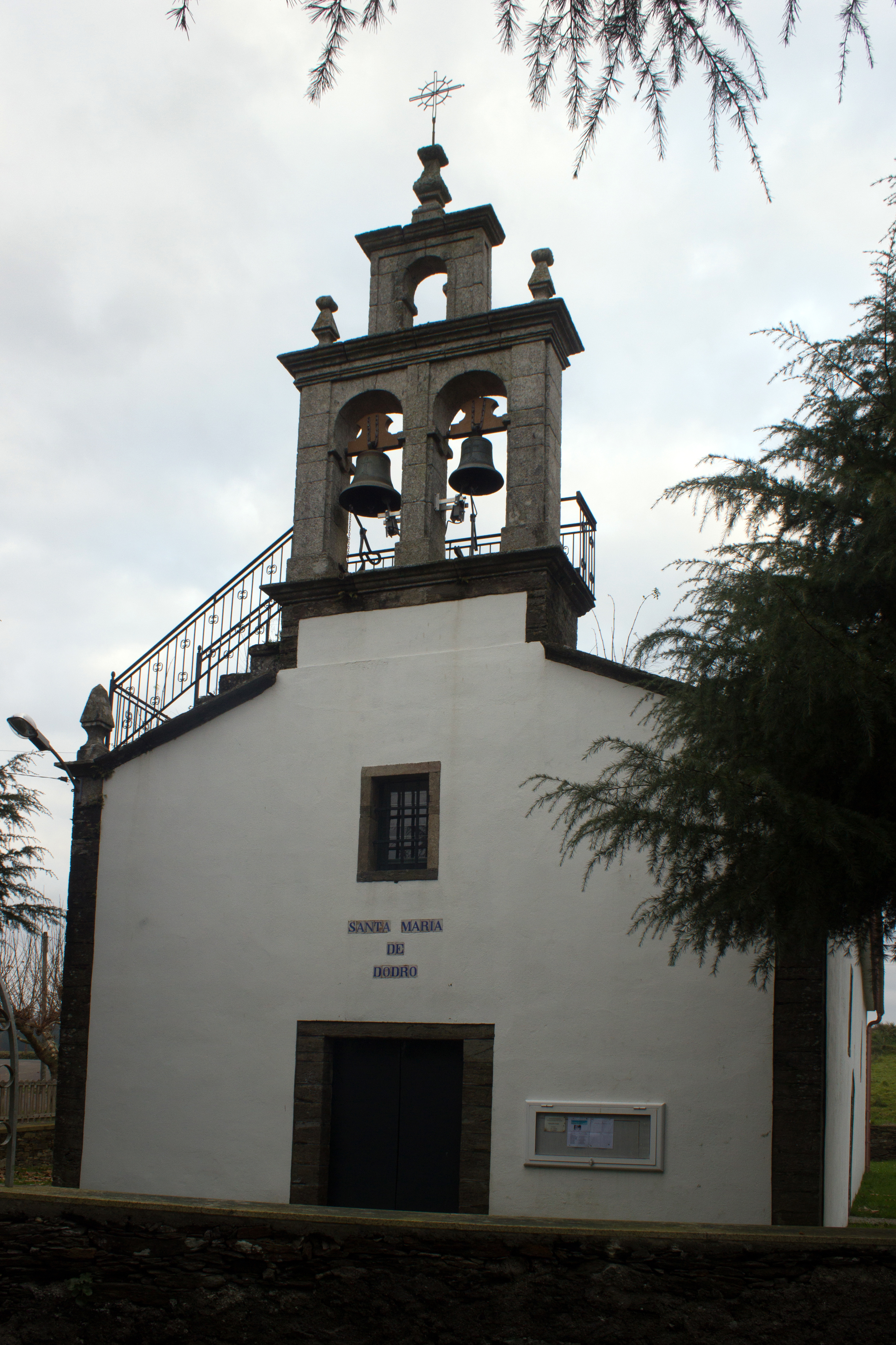 Igrexa de Santa María de Dodro, no concello de Arzúa.